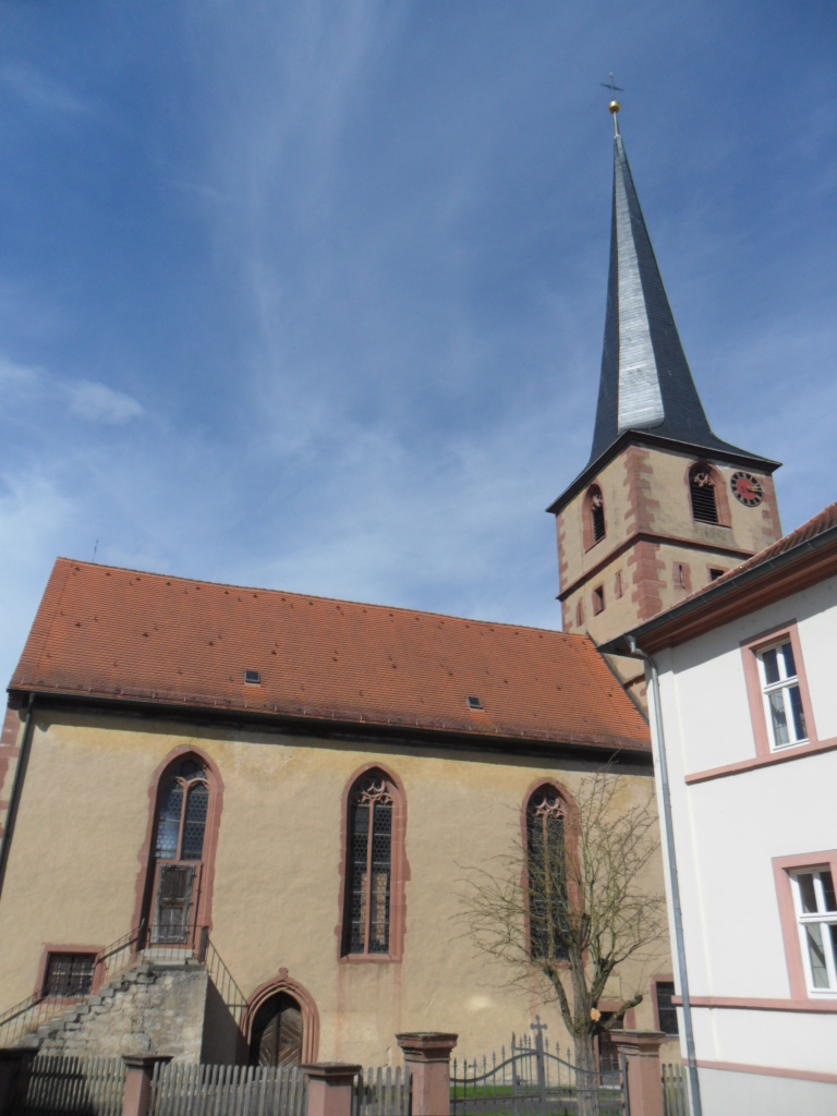 kath. Pfarrkirche Gemeinschaft der Heiligen Unterleinach